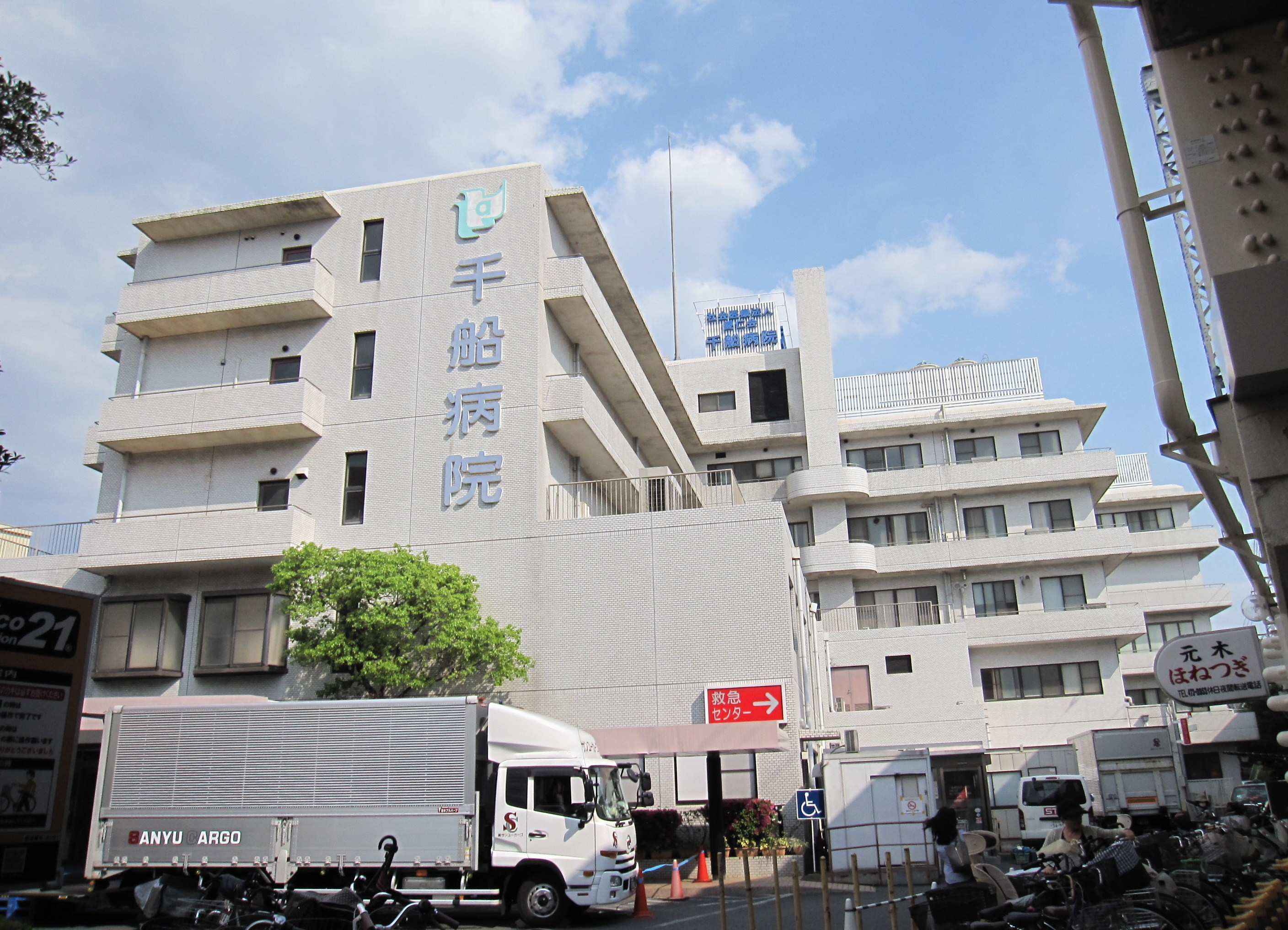 社会医療法人愛仁会千船病院